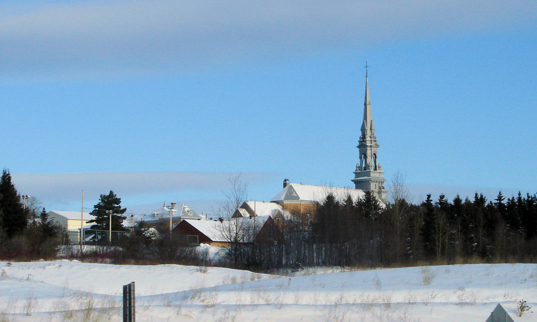 Saint-Louis-du-Ha!Ha!, Quebec, Canada